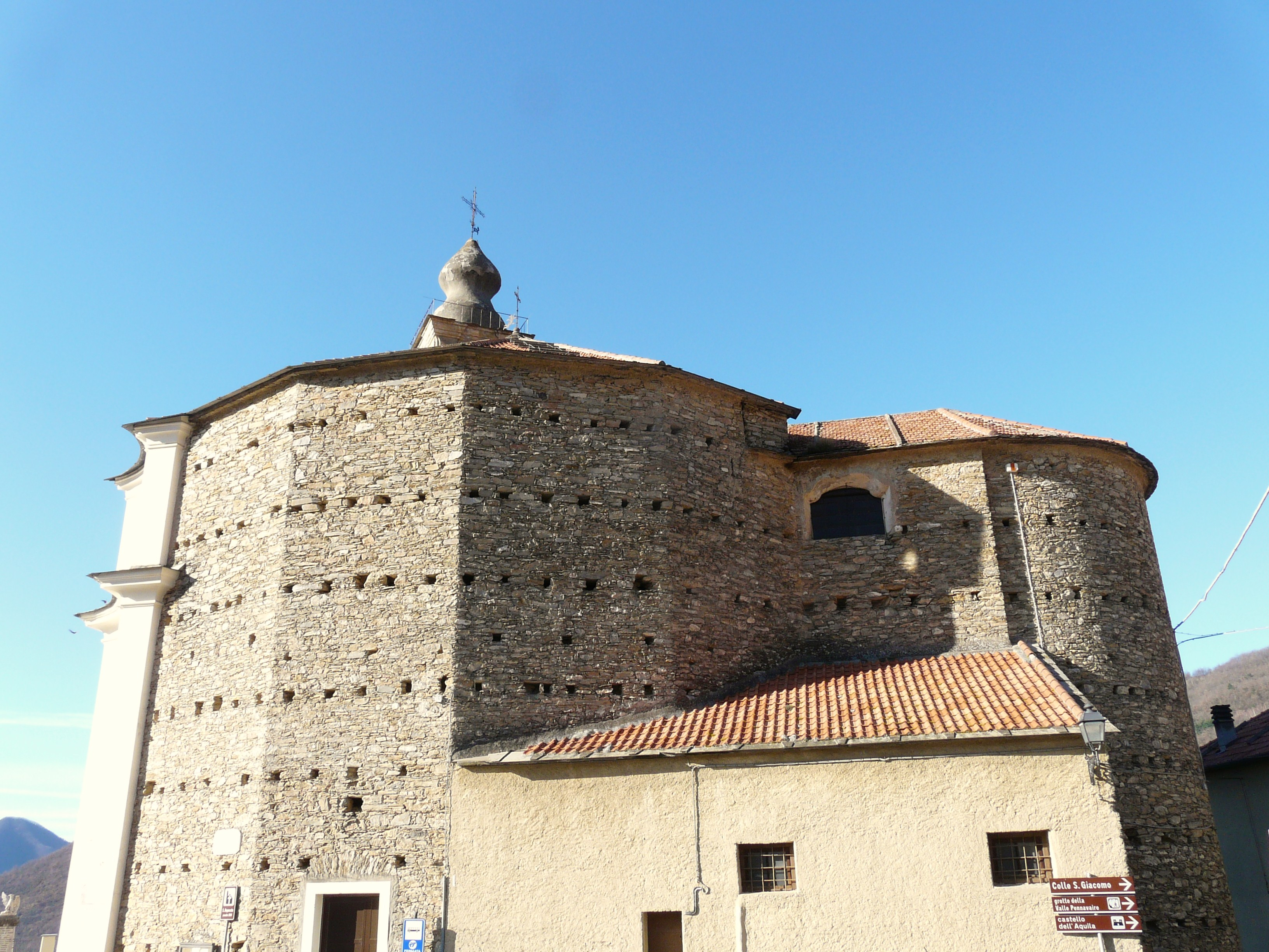 Chiesa di Santa Reparata, Aquila d'Arroscia, Liguria, Italia